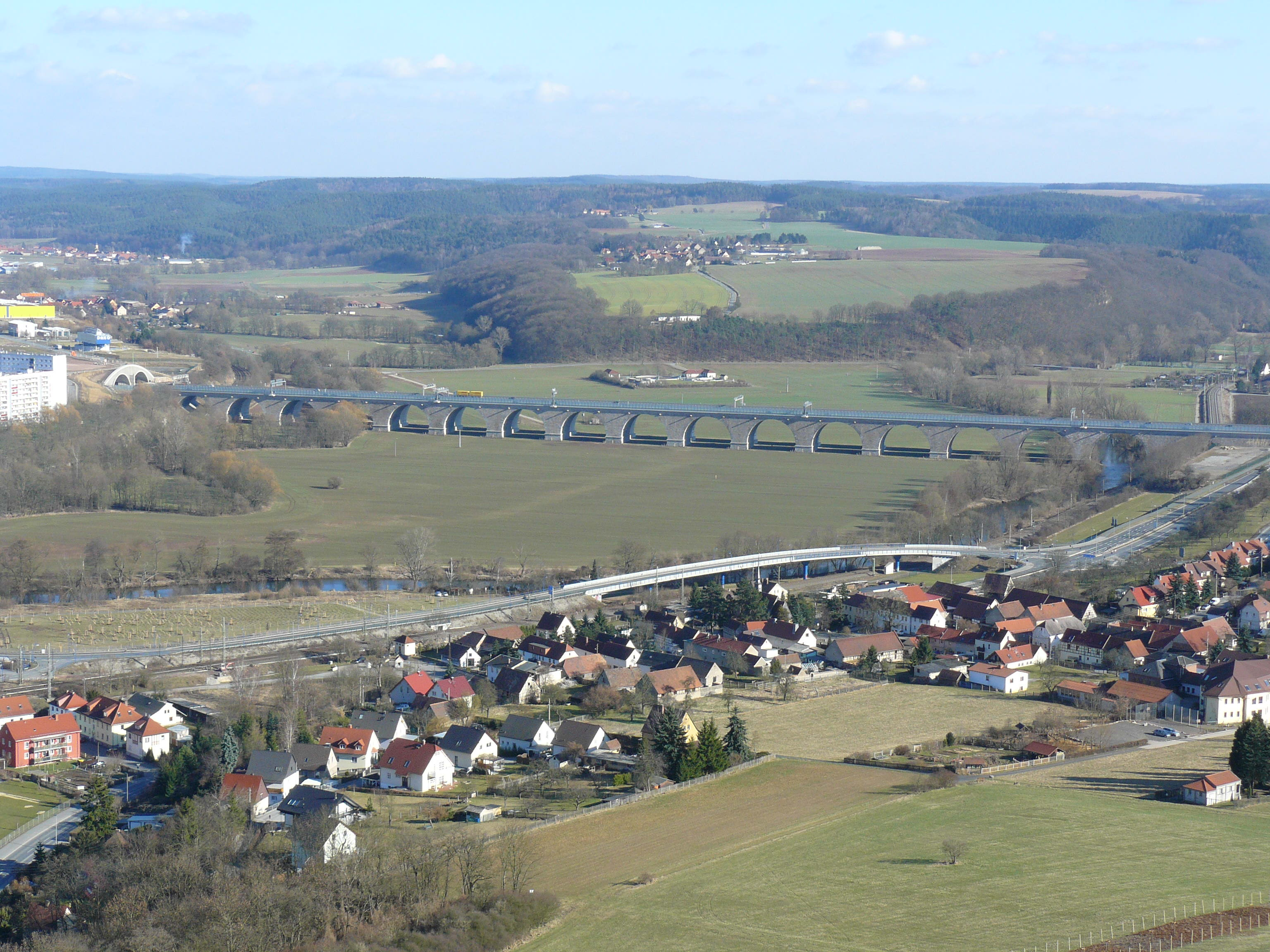 Saaletalbrücke Jena, Aufnahme aus ca. 100 Metern Höhe vom Mönchsberg am Rand des ehemaligen Steinbruchs des Zementwerkes und späteren Schießplatzes in südöstlicher Richtung. Im Vordergrund Jena-Göschwitz und die Saale.